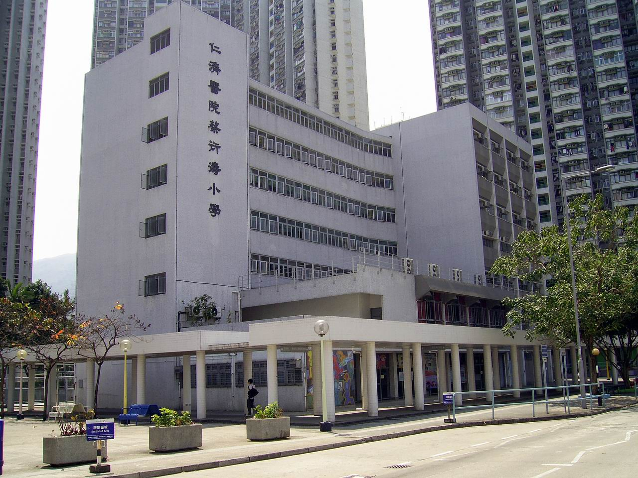 仁濟醫院蔡衍濤小學